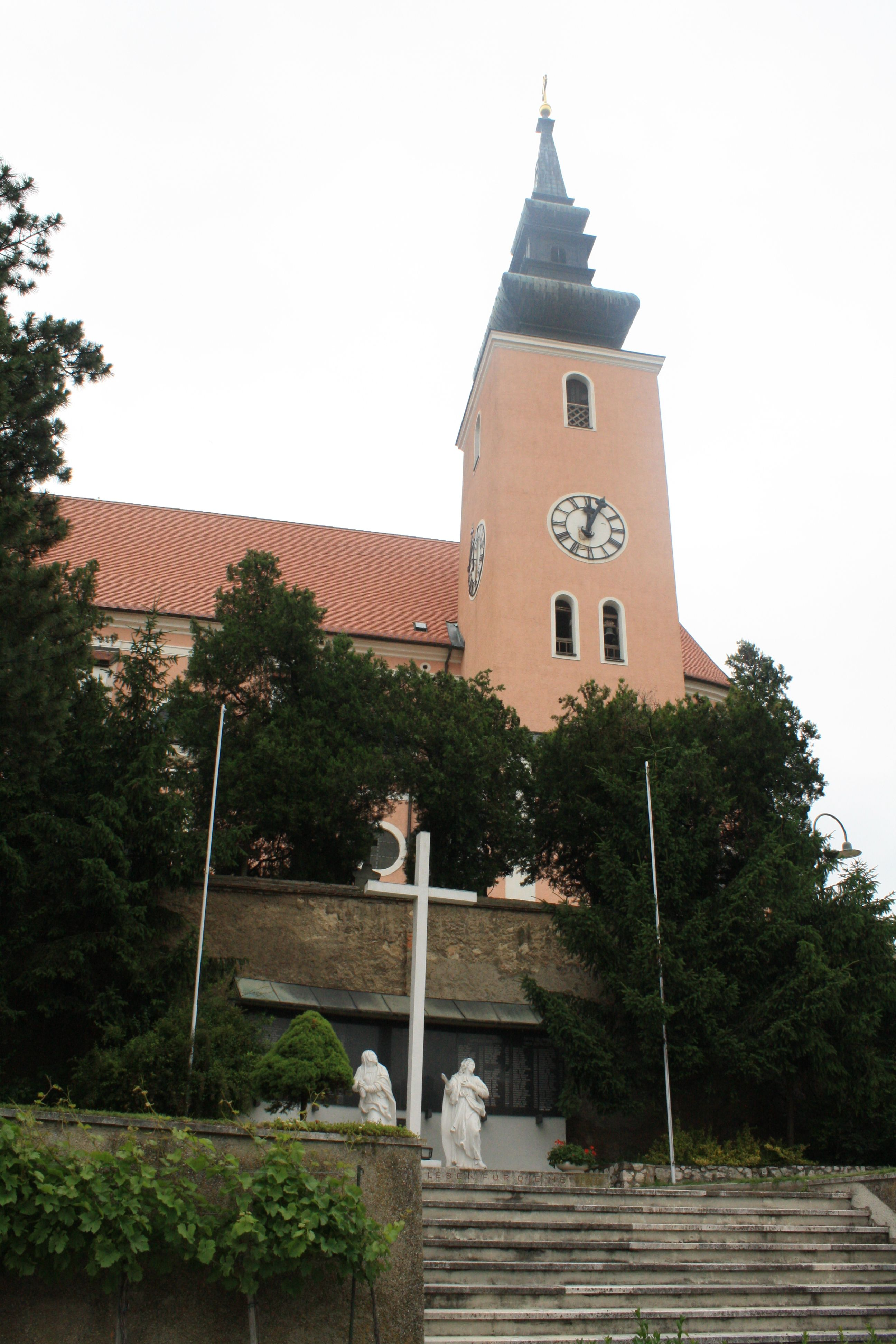 Pfarrkirche von Poysdorf